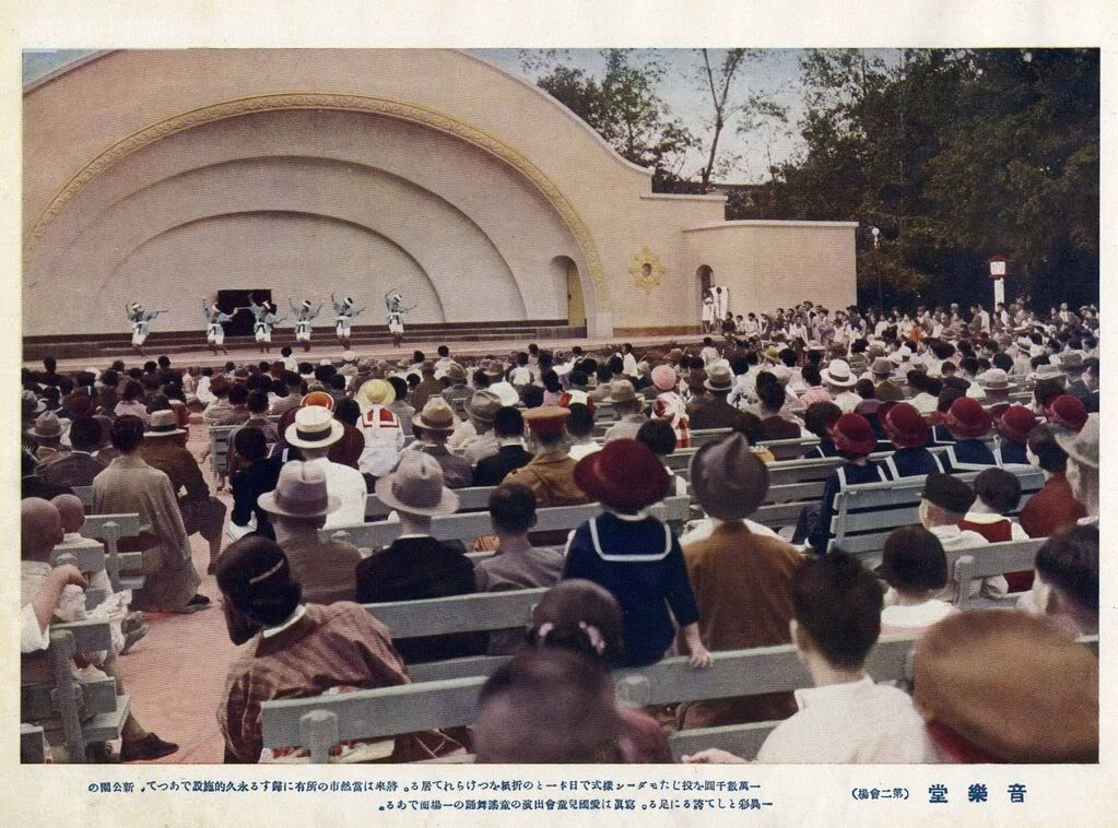 台北新公園音樂堂，1935年